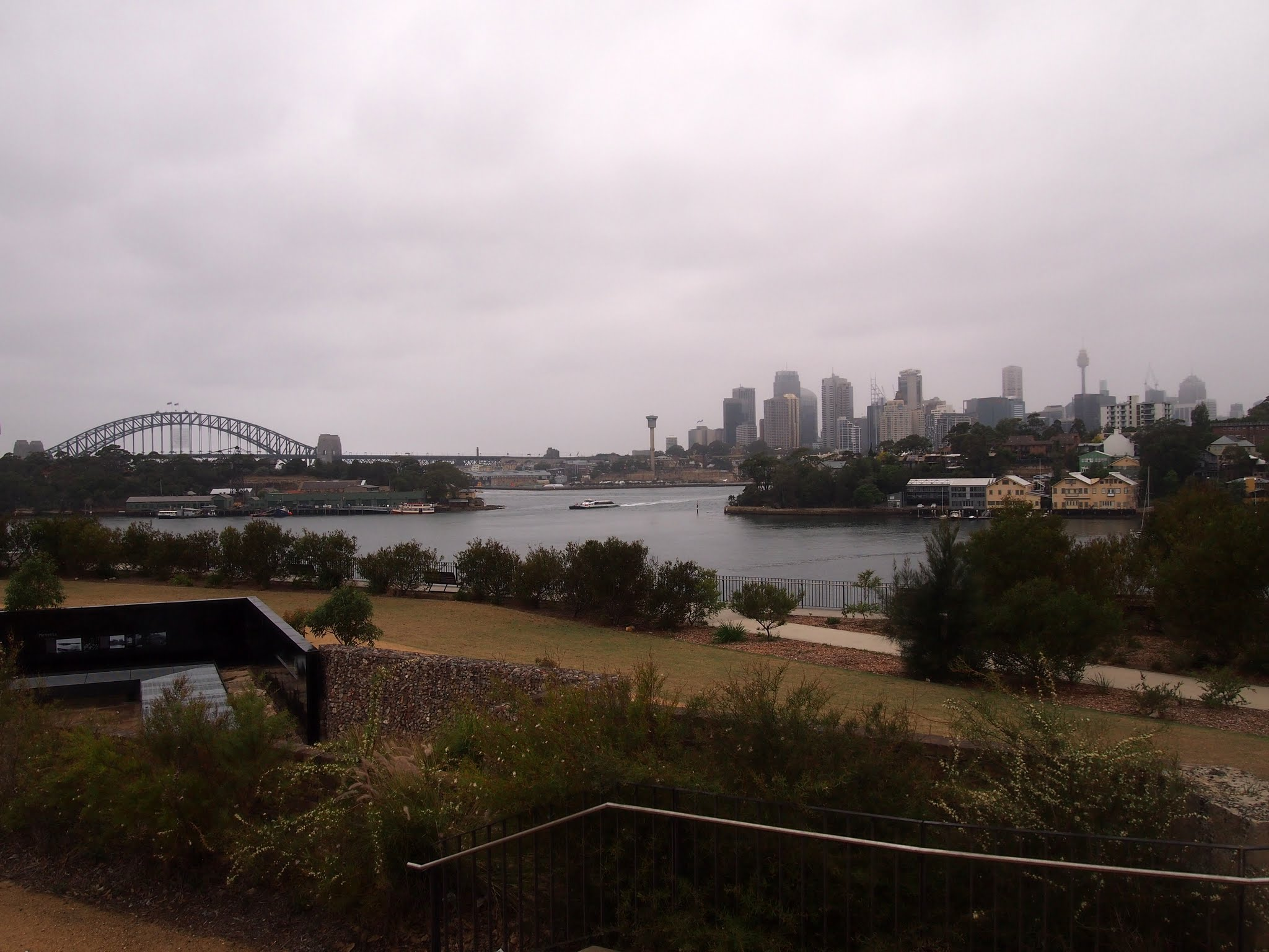 Ballast Point